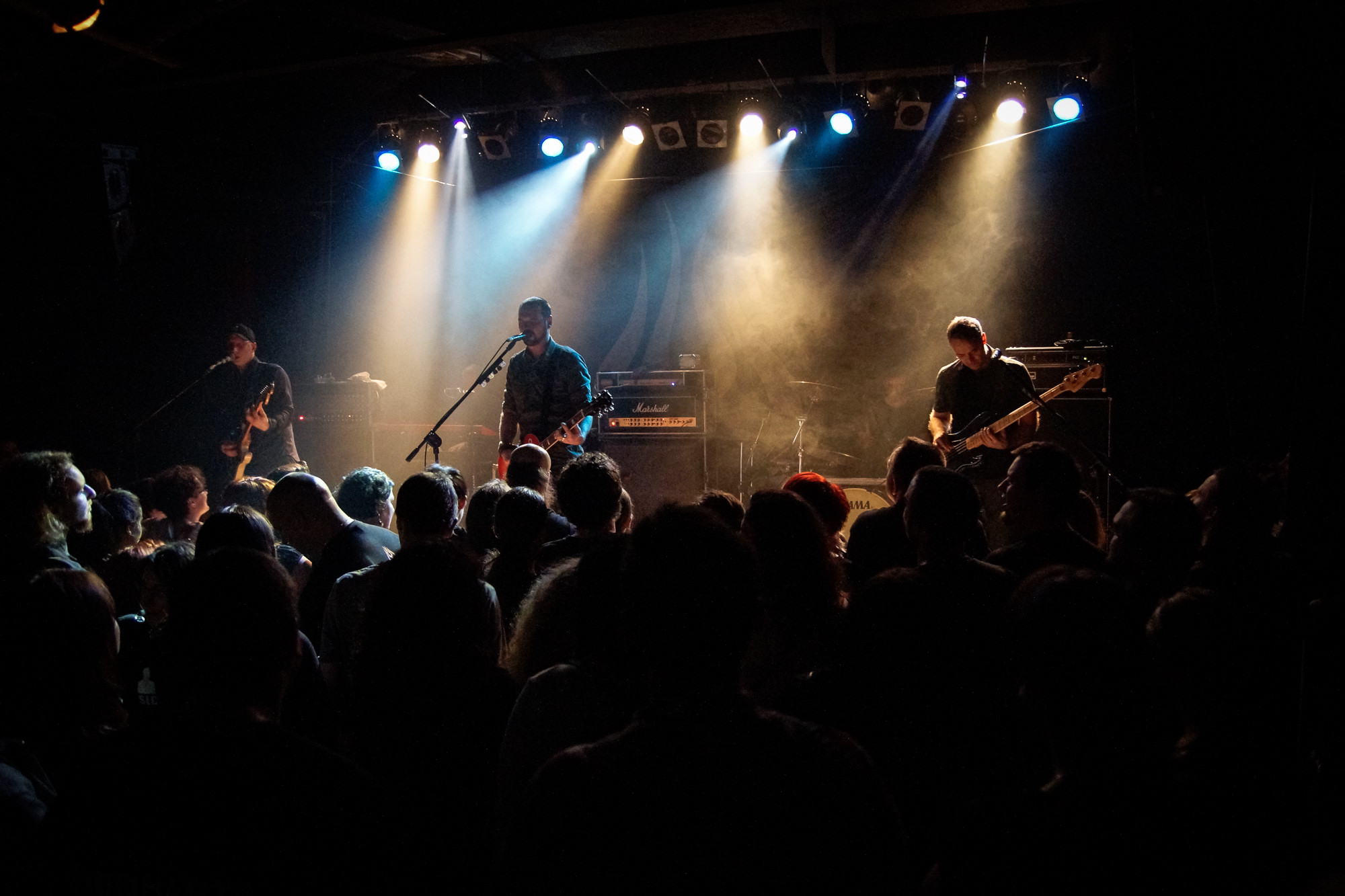 Zespół Siddharta, Progresja, Warszawa 2014.